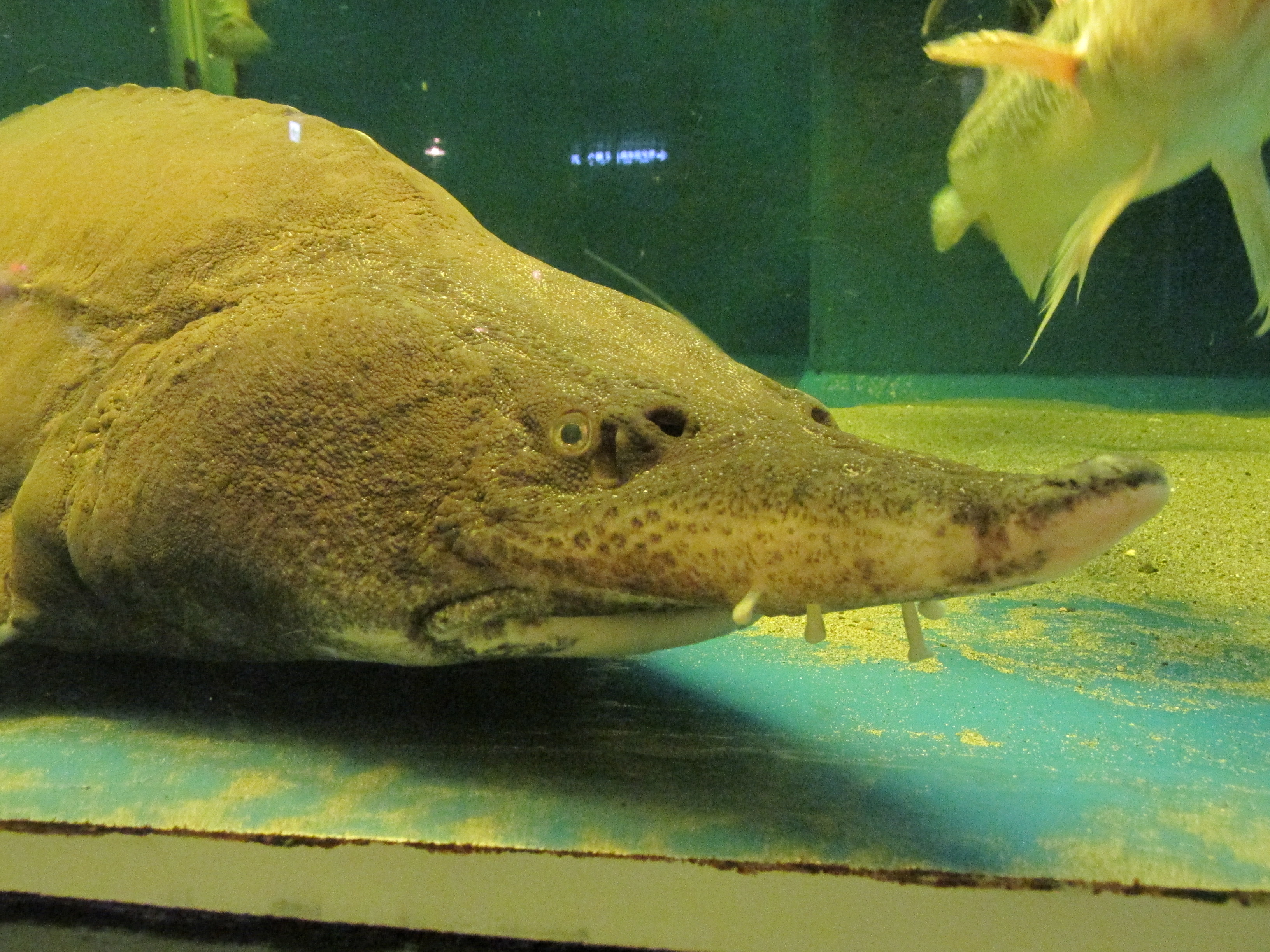 2017/06/25 浅虫水族館展示 ダウリアチョウザメ